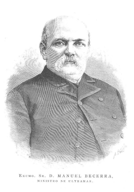 Grabado de Manuel Becerra, recogido en la revista española La Ilustración Española y Americana.